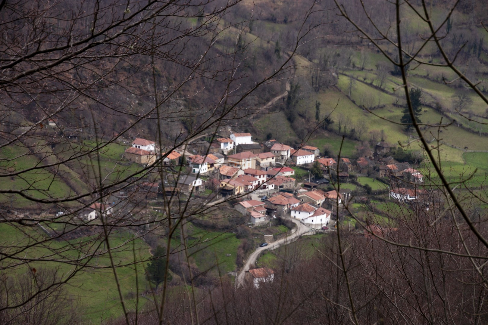 Vista general de Conforcos, Aller, Asturias